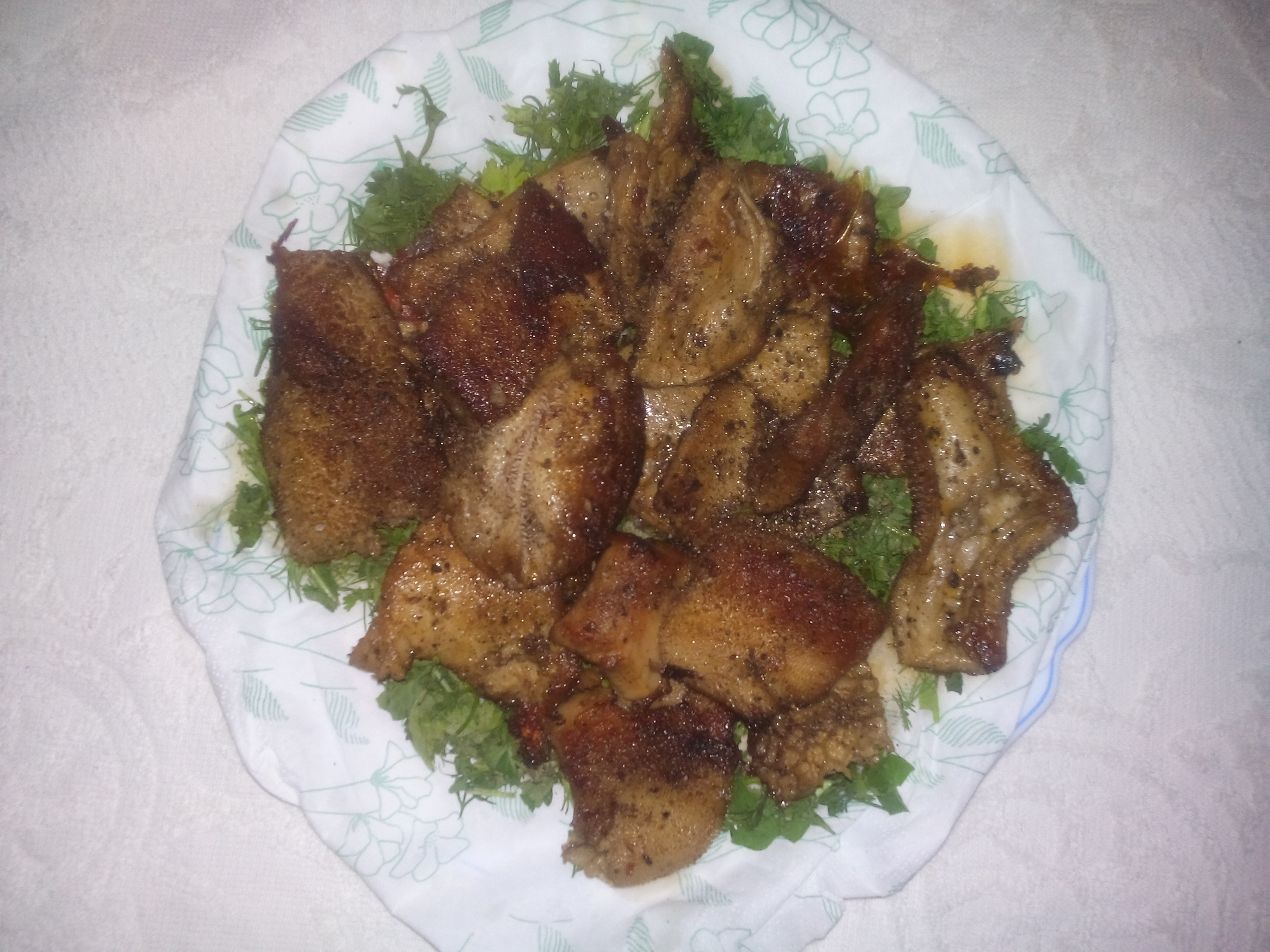 كرشة مصرية